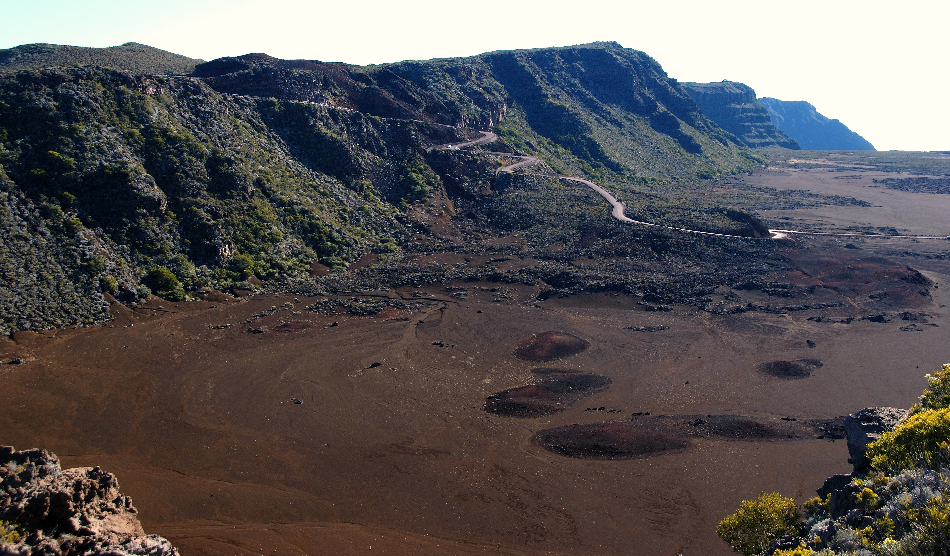 Le Pas des Sables est un passage dans la Plaine des sables sur une ancienne coulée de lave qui s'y est déversé